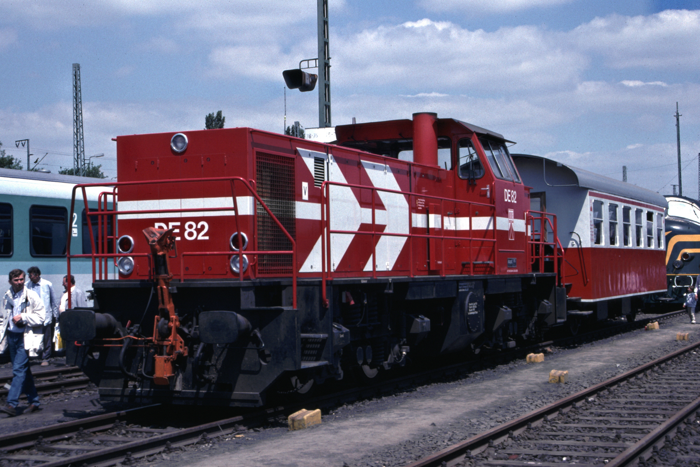 MAK DE 1002 als DE 82 der ehem. Köln-Bonner Eisenbahnen in Köln Gereon